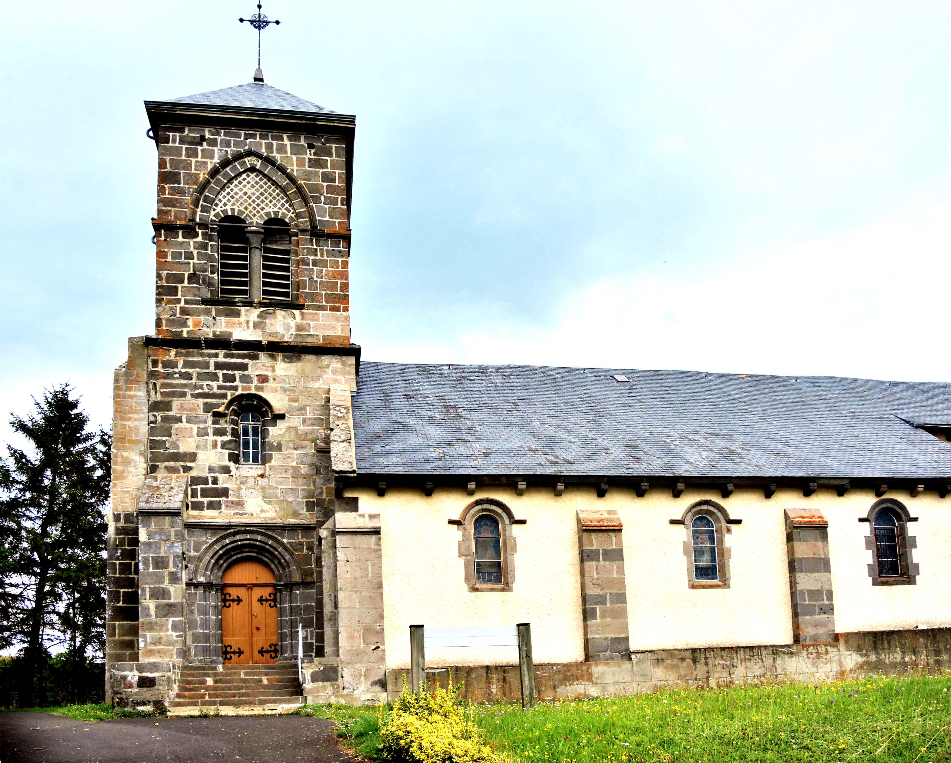 Eglise de l'Assomption de Saulzet-le-Froid. Puy-de-Dôme